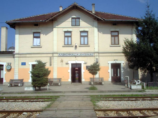 La gare ferroviaire de Žitkovac, fin XIXe siècle.